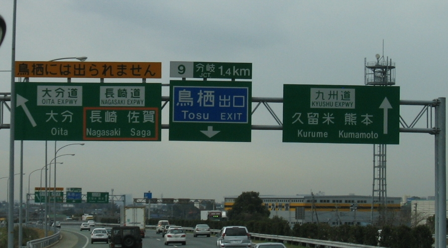 九州自動車道下り線にある、鳥栖ジャンクションの行先表示板